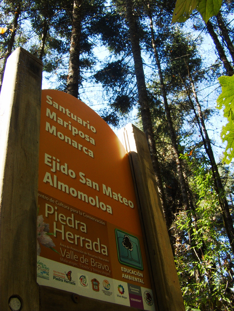 Temascaltepec, Edo. de México Santuario de la Mariposa, Monarca. Diciembre 2008